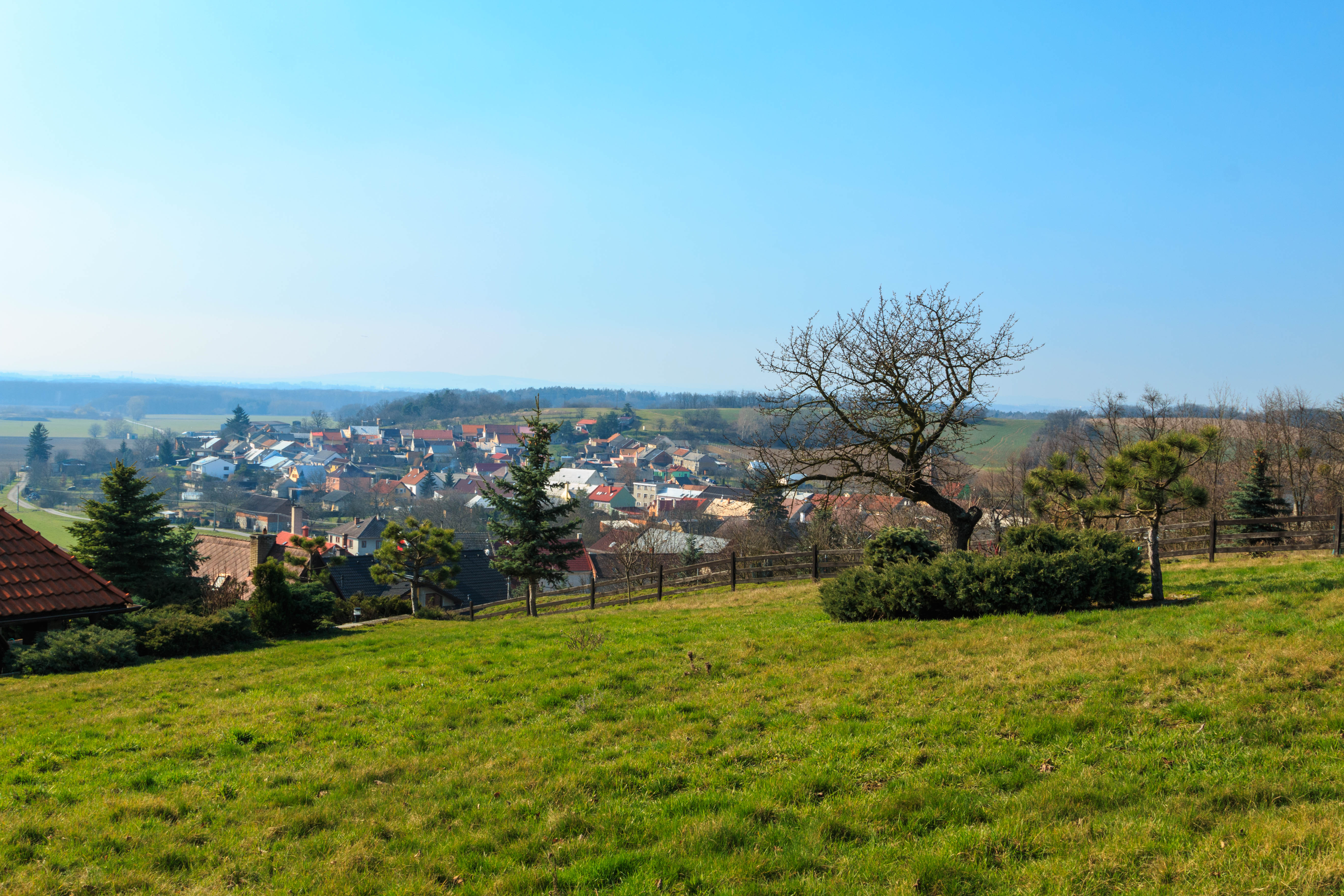 Pohled na Krčmaň od Krčmaňského borku Project: Chráněná území